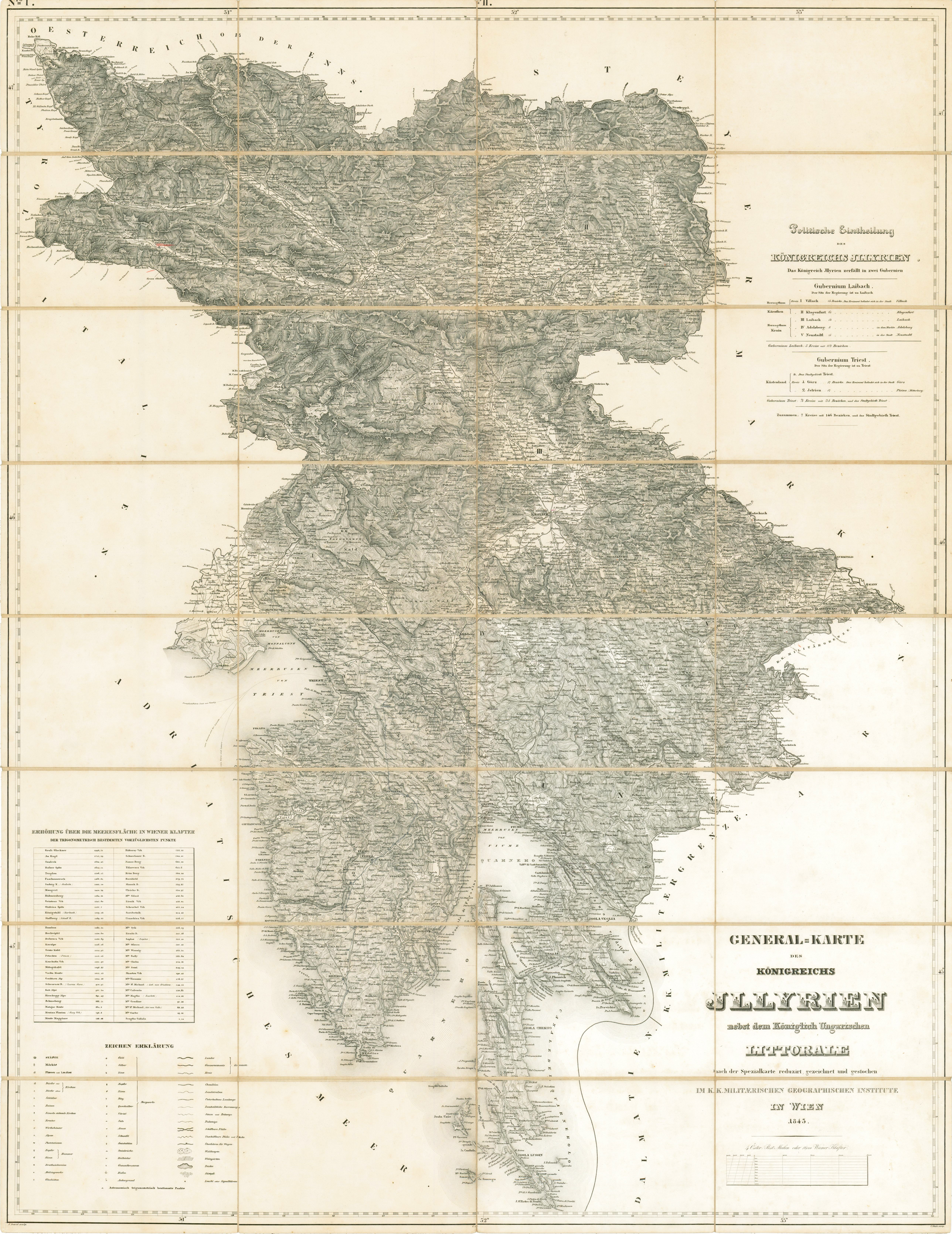 General-Karte des Königreichs Illyrien nebst dem Königlich Ungarischen Littorale.